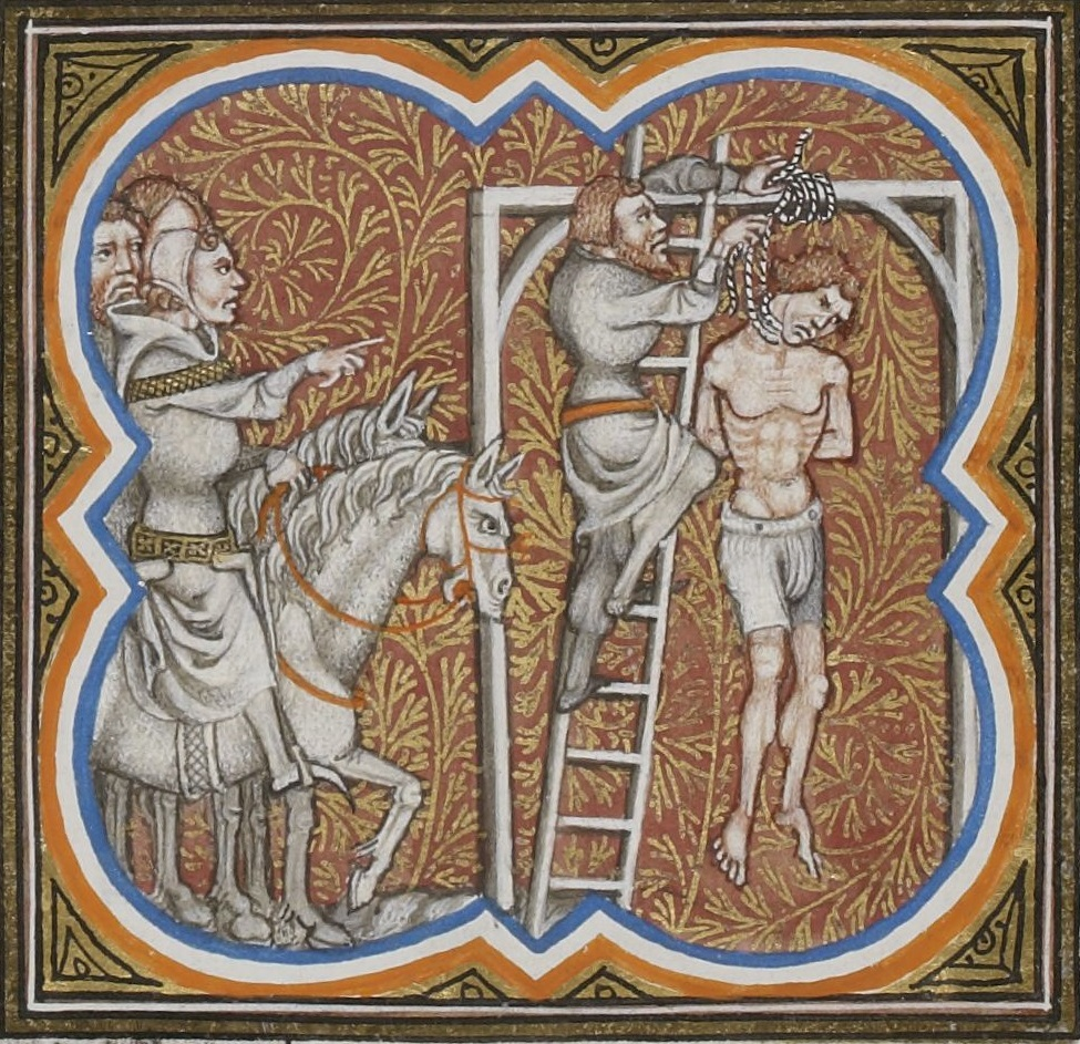 Pendaison des partisans de Thomas de Marle, sire de Coucy, conséquemment à leur révolte contre le roi Louis VI le Gros. Enluminure des Grandes Chroniques de France, vers 1375-1380. Paris, Bibliothèque Nationale de France, département des Manuscrits, Français 2813, folio 200 recto.